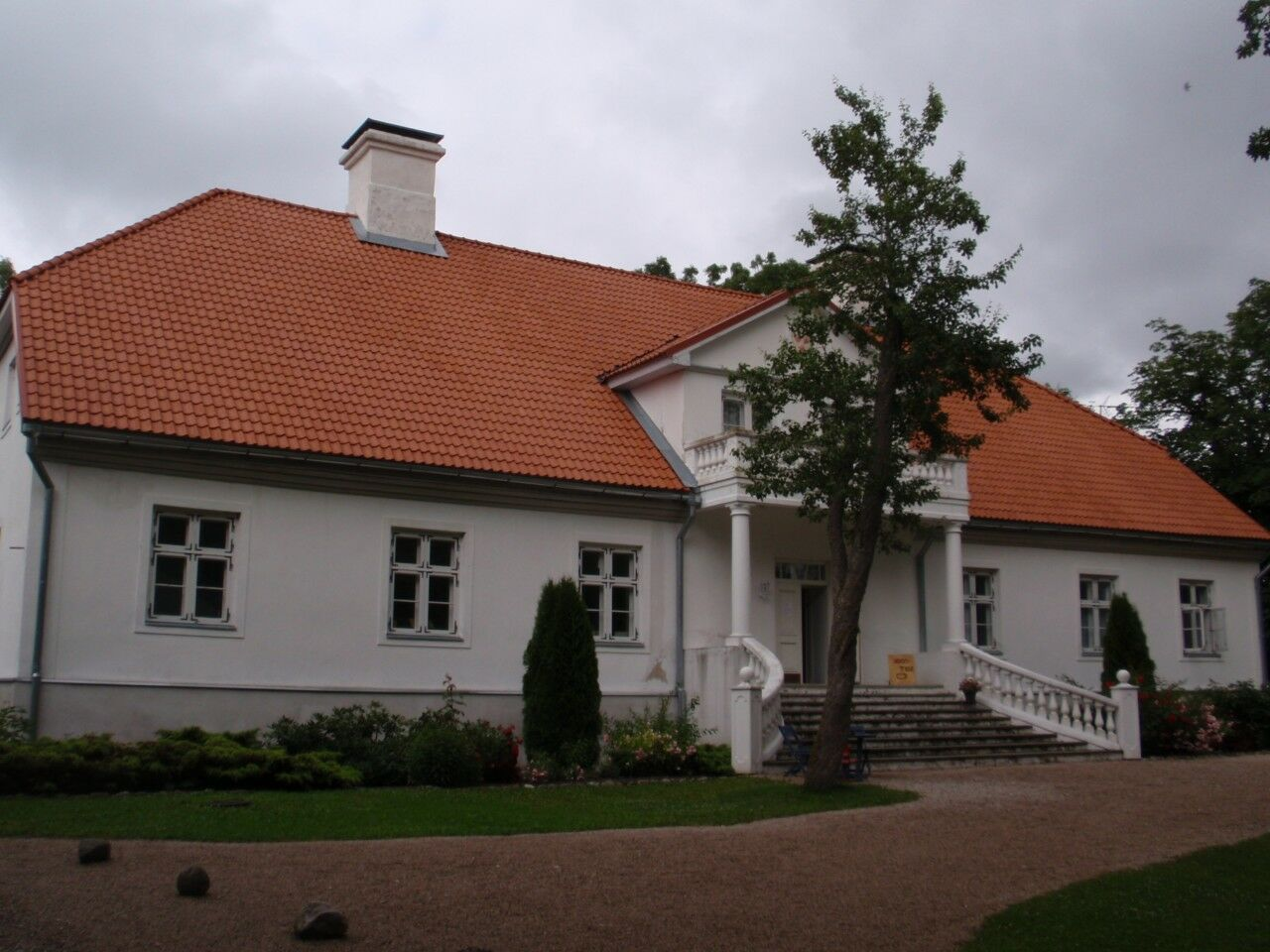 Saare (Lückholmi) mõis Noarootsis.